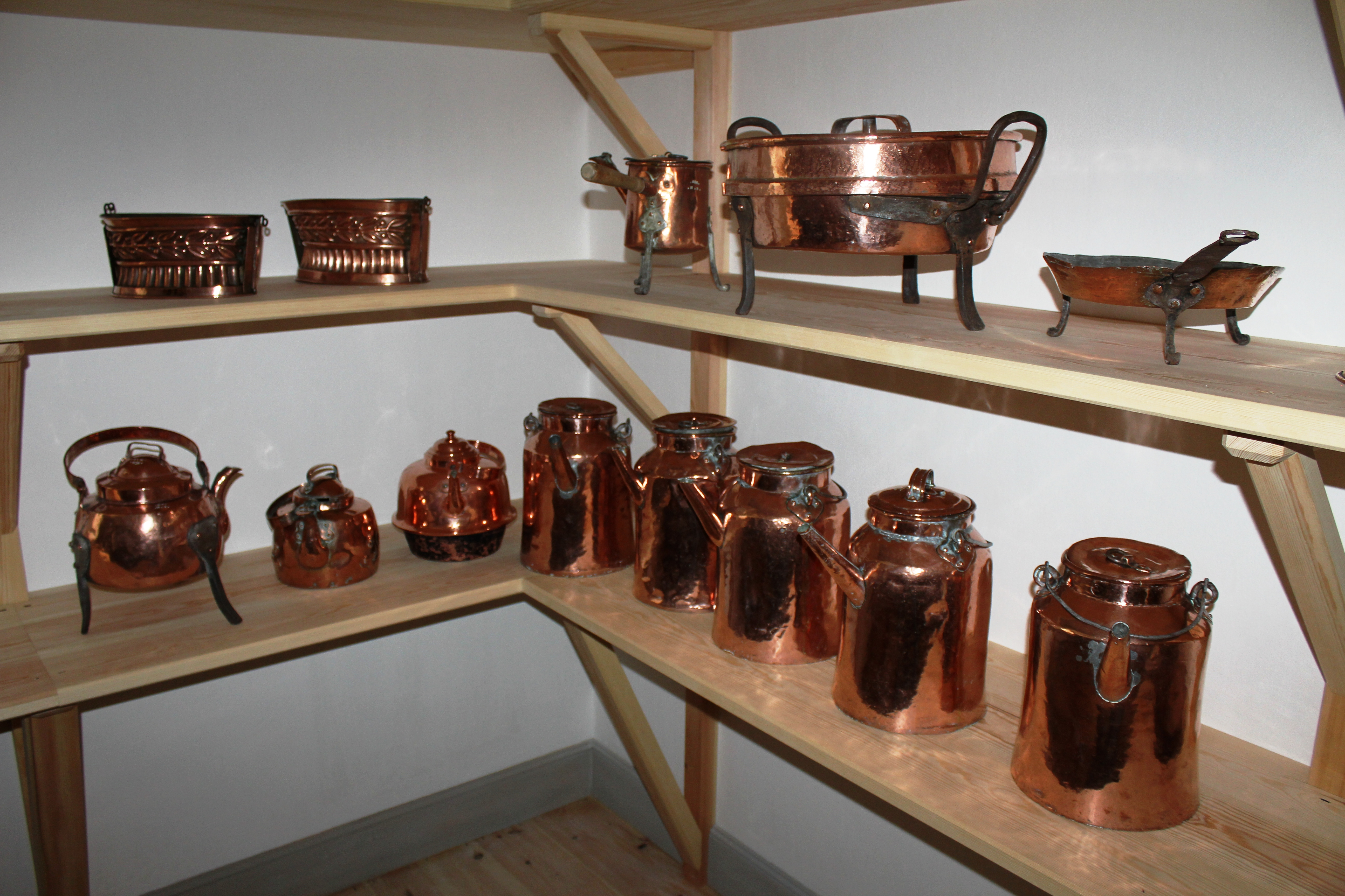 Kanner i kobber i kjelleren på Eidsvoldsbygningen